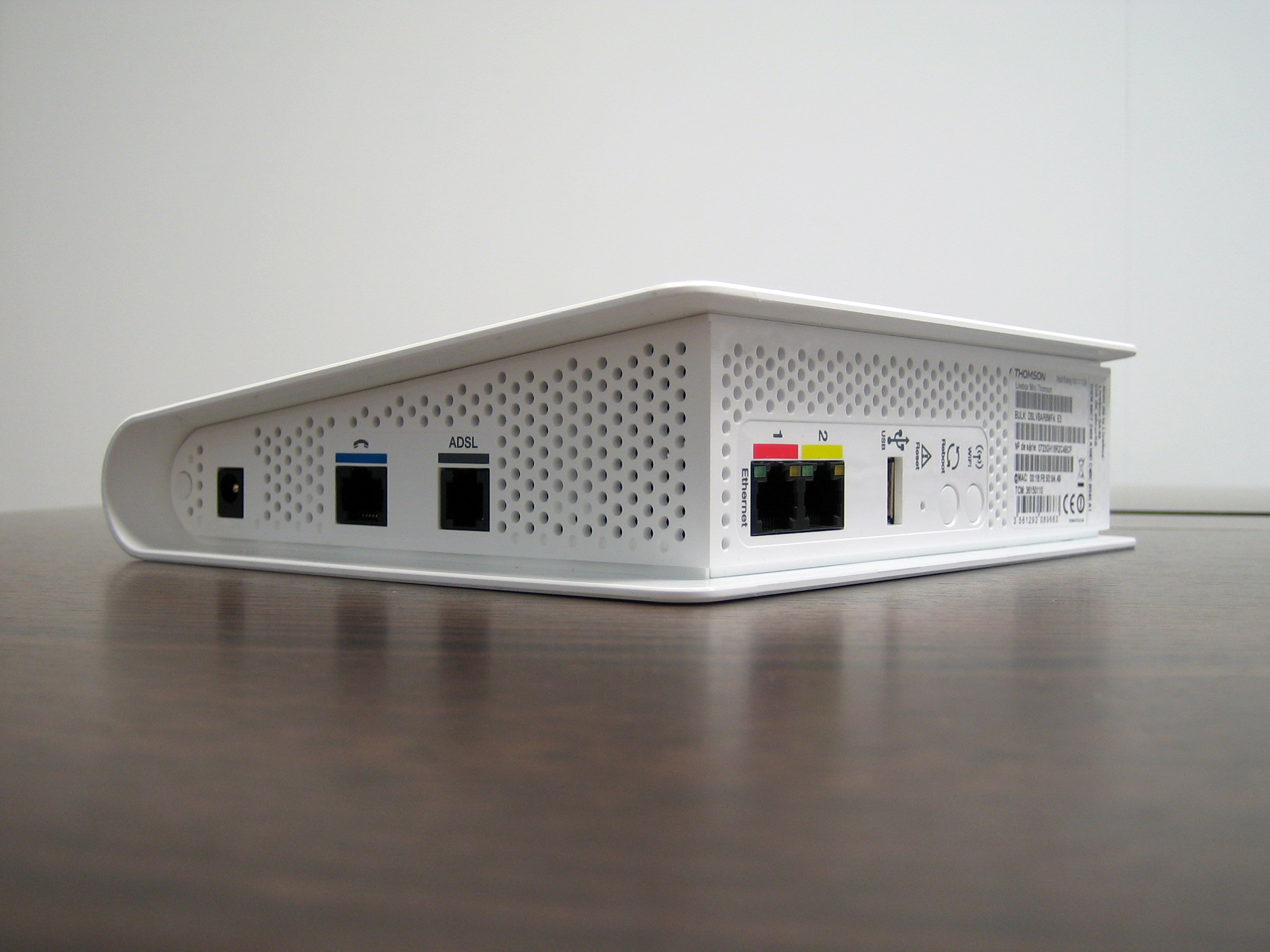 gros plan sur les ports de la livebox 1.2